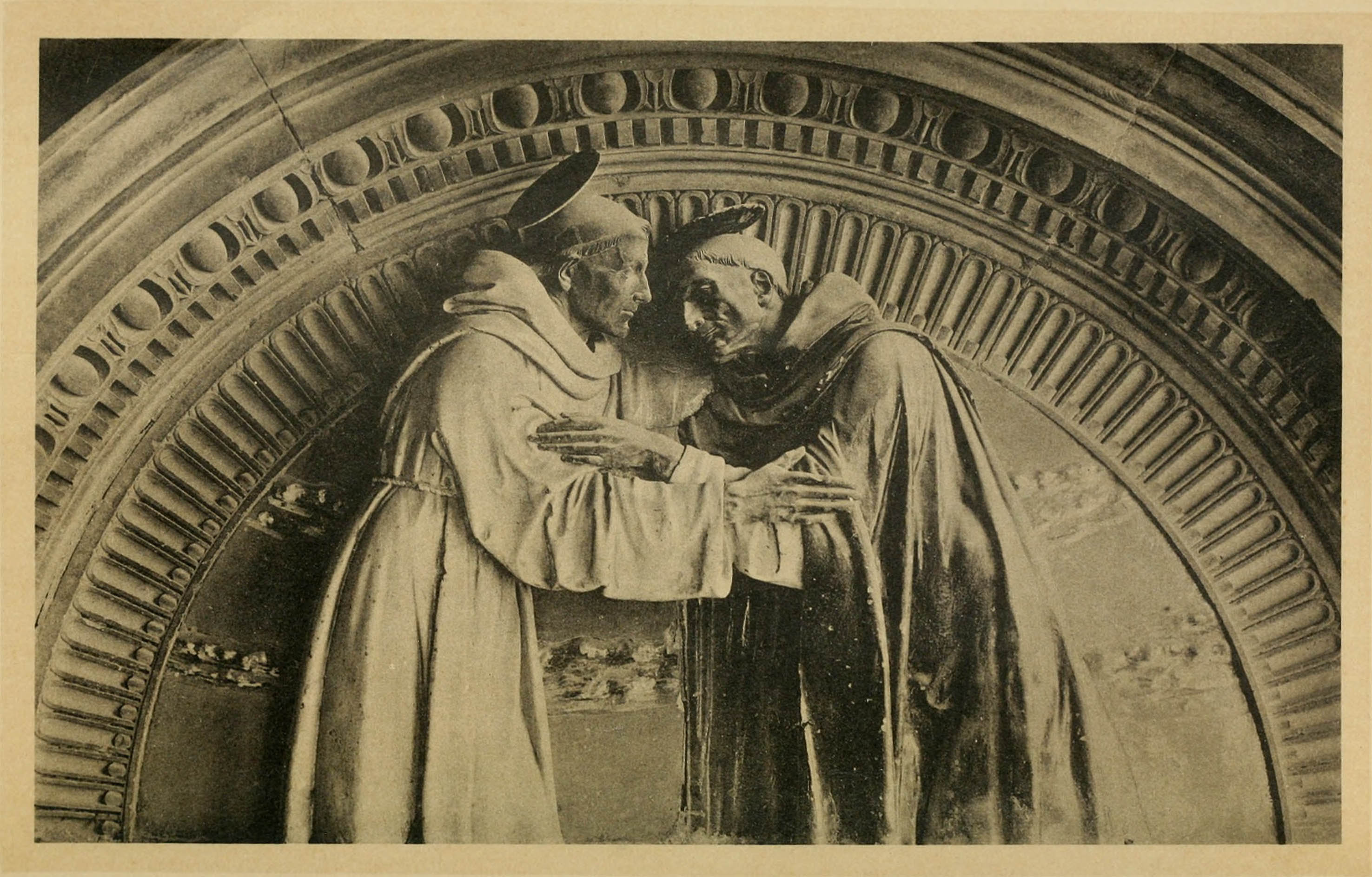 ANDREA DELLA ROBBIA La rencontre de saint François et de saint Dominique Bas-relief, terre cuite polychrome. Florence, Loggia di San Paolo. Cliché Alinari